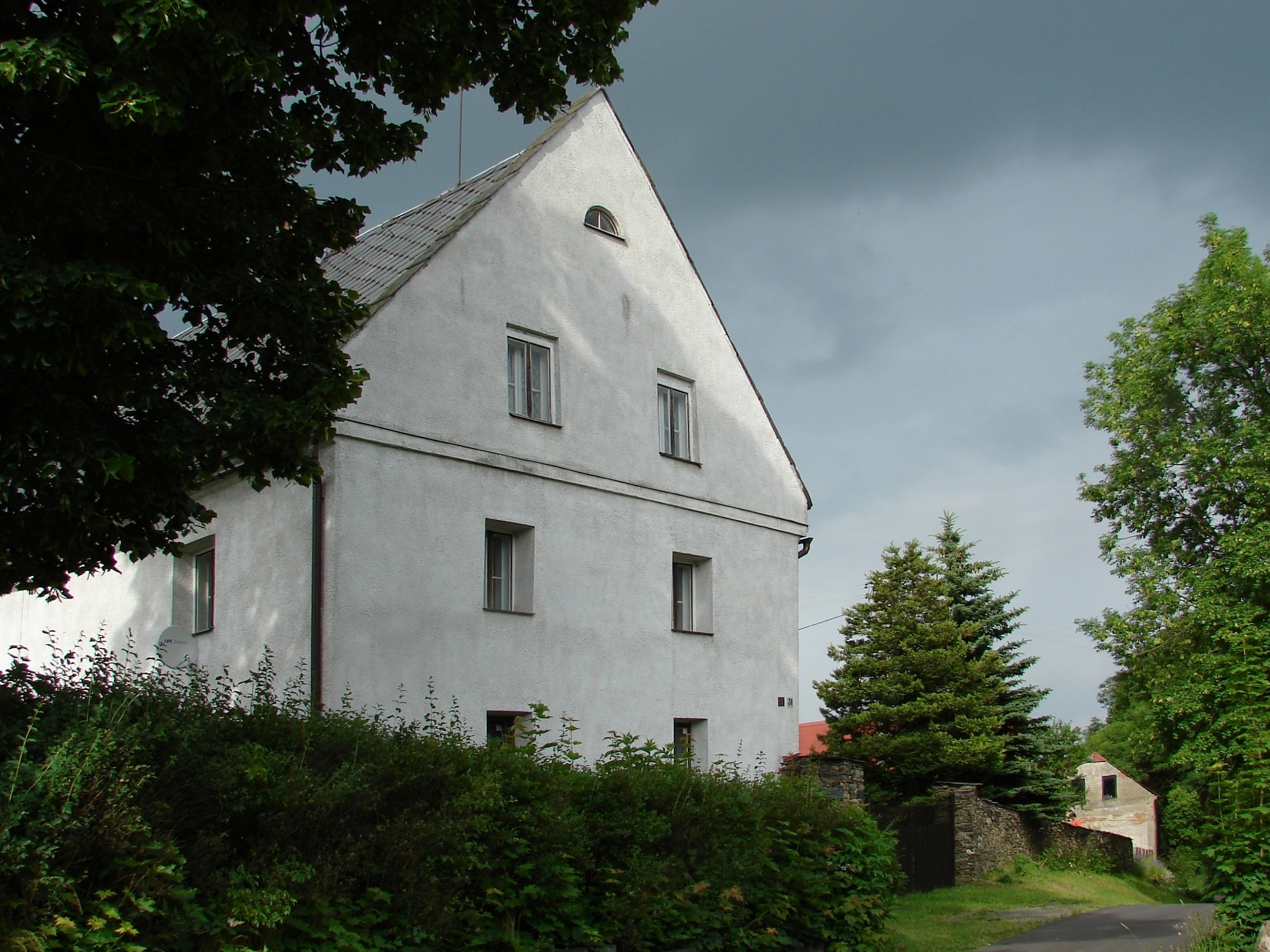 Bývalá fara, Dolní Guntramovice 31, Dolní Guntramovice.